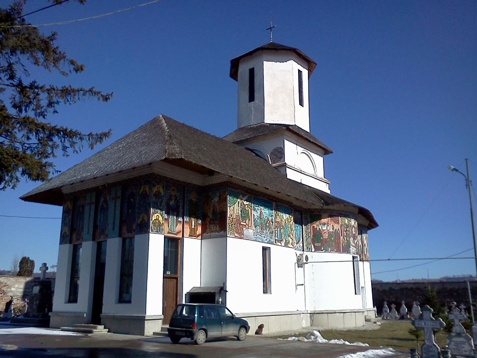 Fostul schit „Poiana”